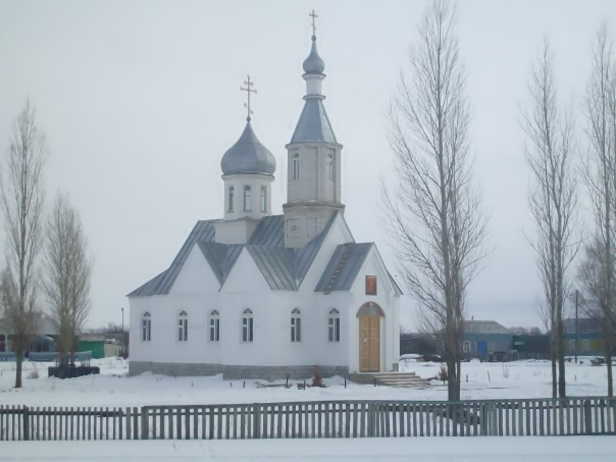 Эта церковь построена совсем недавно,поэтому её и называют "новой"